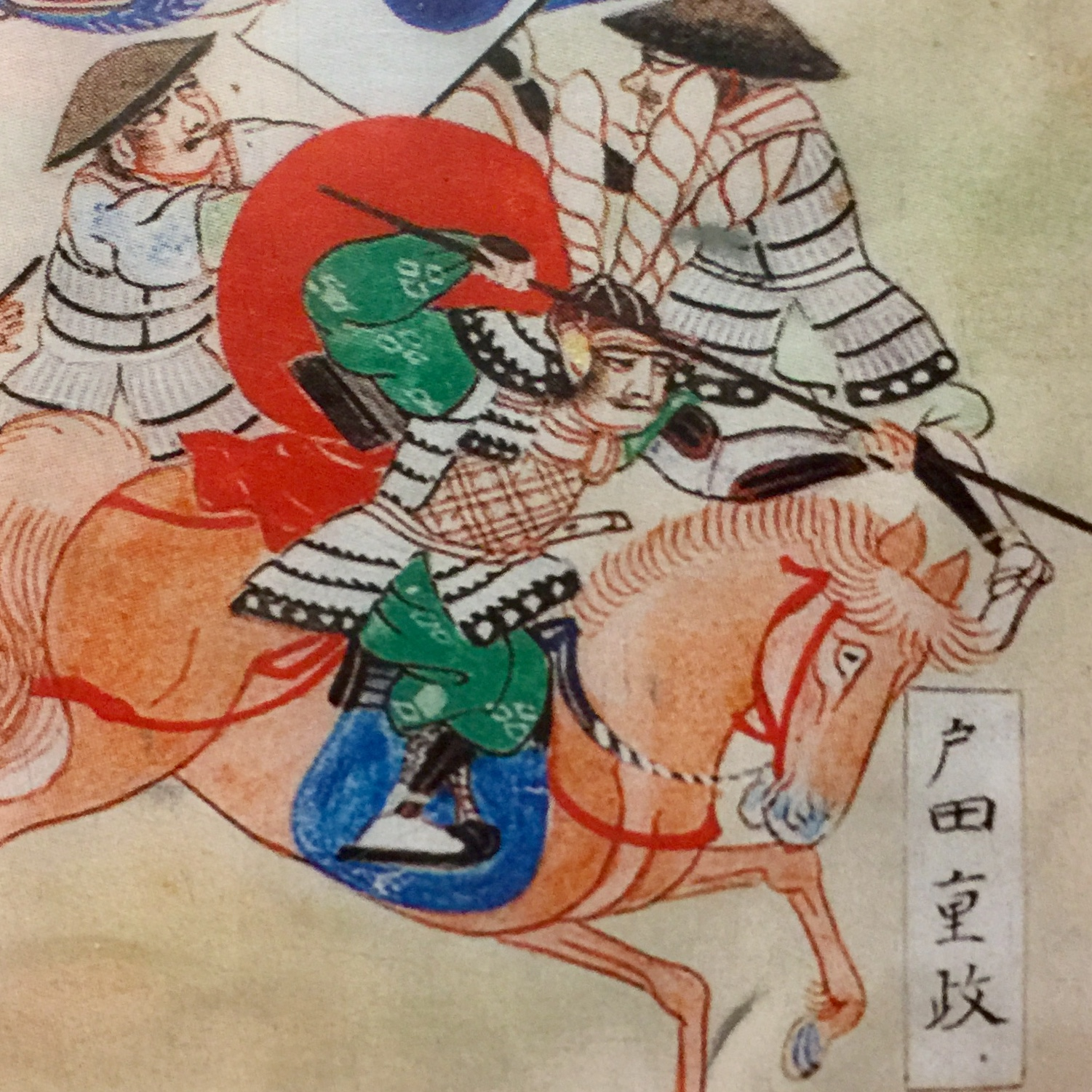 関ヶ原合戦図屏風（関ケ原町歴史民俗資料館本）に描かれた、豊臣家家臣の戸田重政（勝成）。